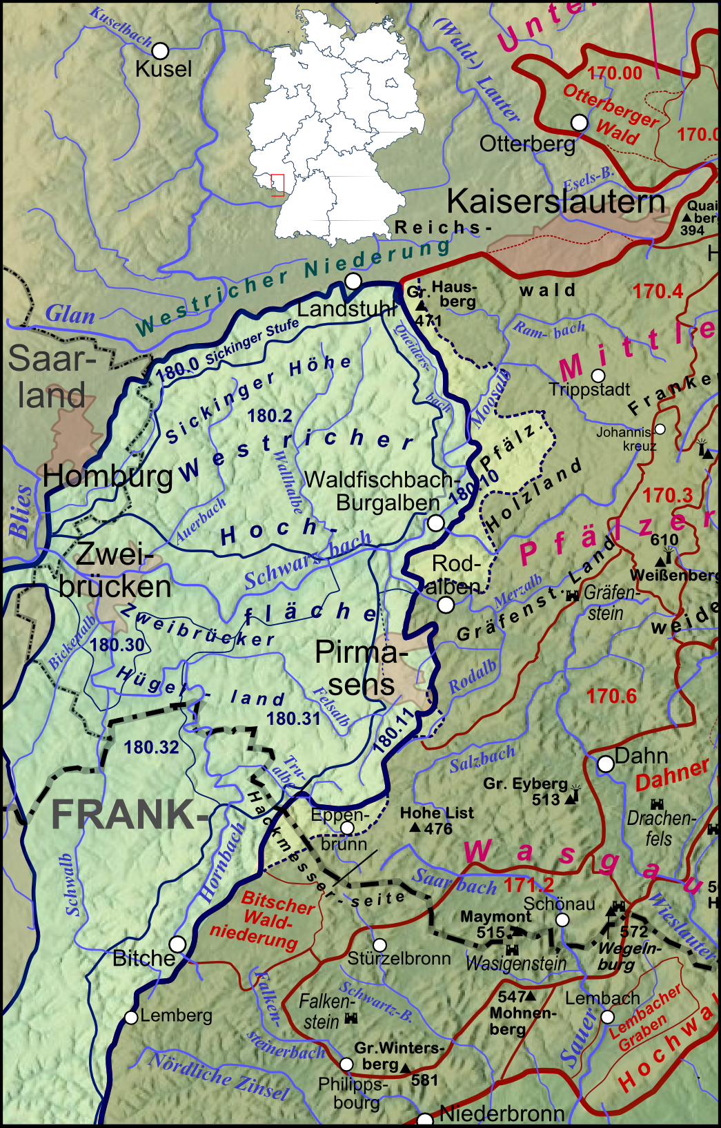 Naturräume der Westricher Hochfläche (aufgehellt, dunkelblaue Grenzziehung und Beschriftungen) im westlichen Anschluss an den Pfälzerwald nebst südlicher Fortsetzung nach Lothringen;der aufgehellte Bereich rechts der dicken blauen Linie war in der naturräumlichen Gliederung dem Zweibrücker Westrich zugerechnet worden, zählt aber landläufig bereits zum Pfälzerwald (und liegt auch in dessen Naturpark)